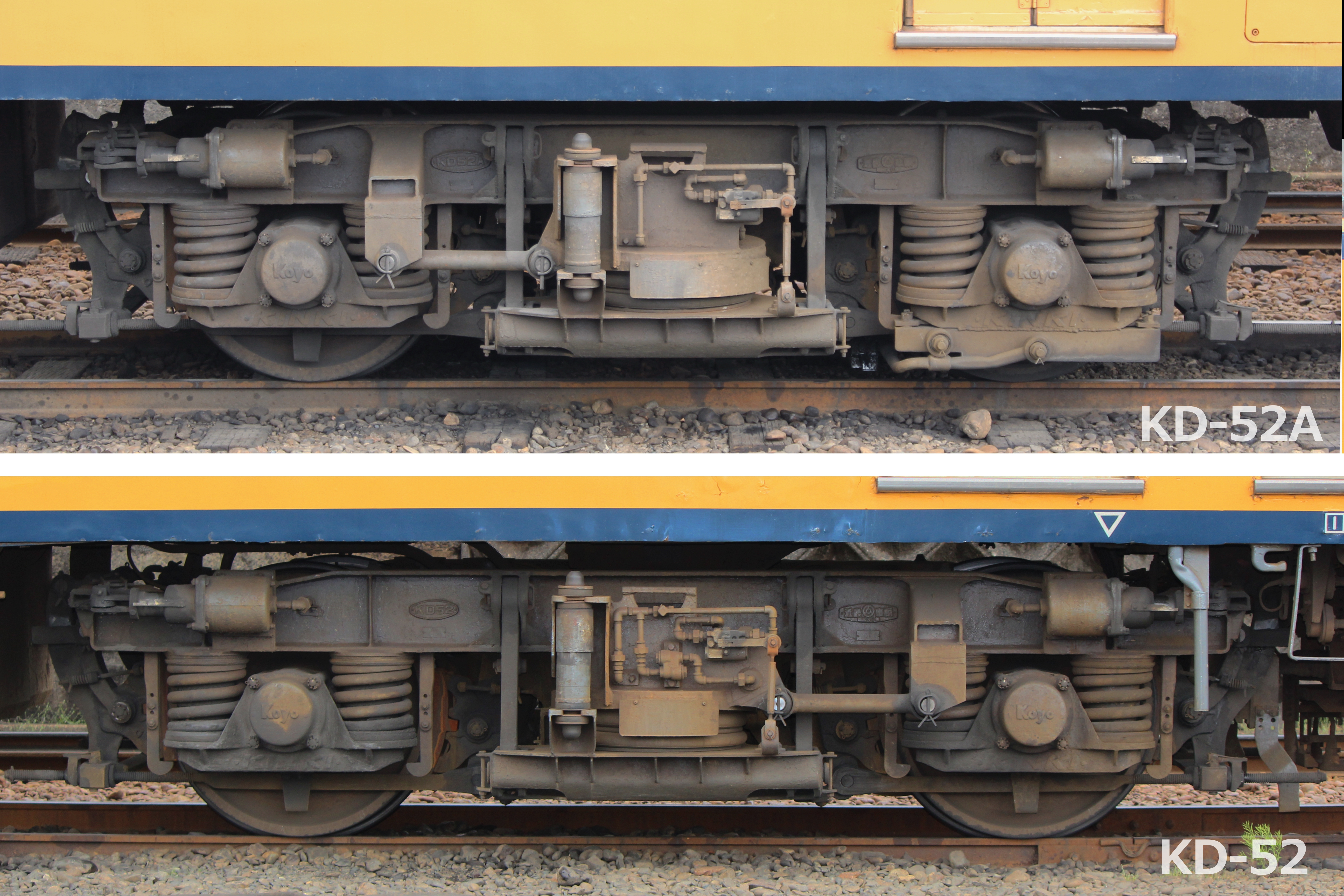 近鉄16000系（現大井川鉄道16000系）KD-52・KD-52A台車